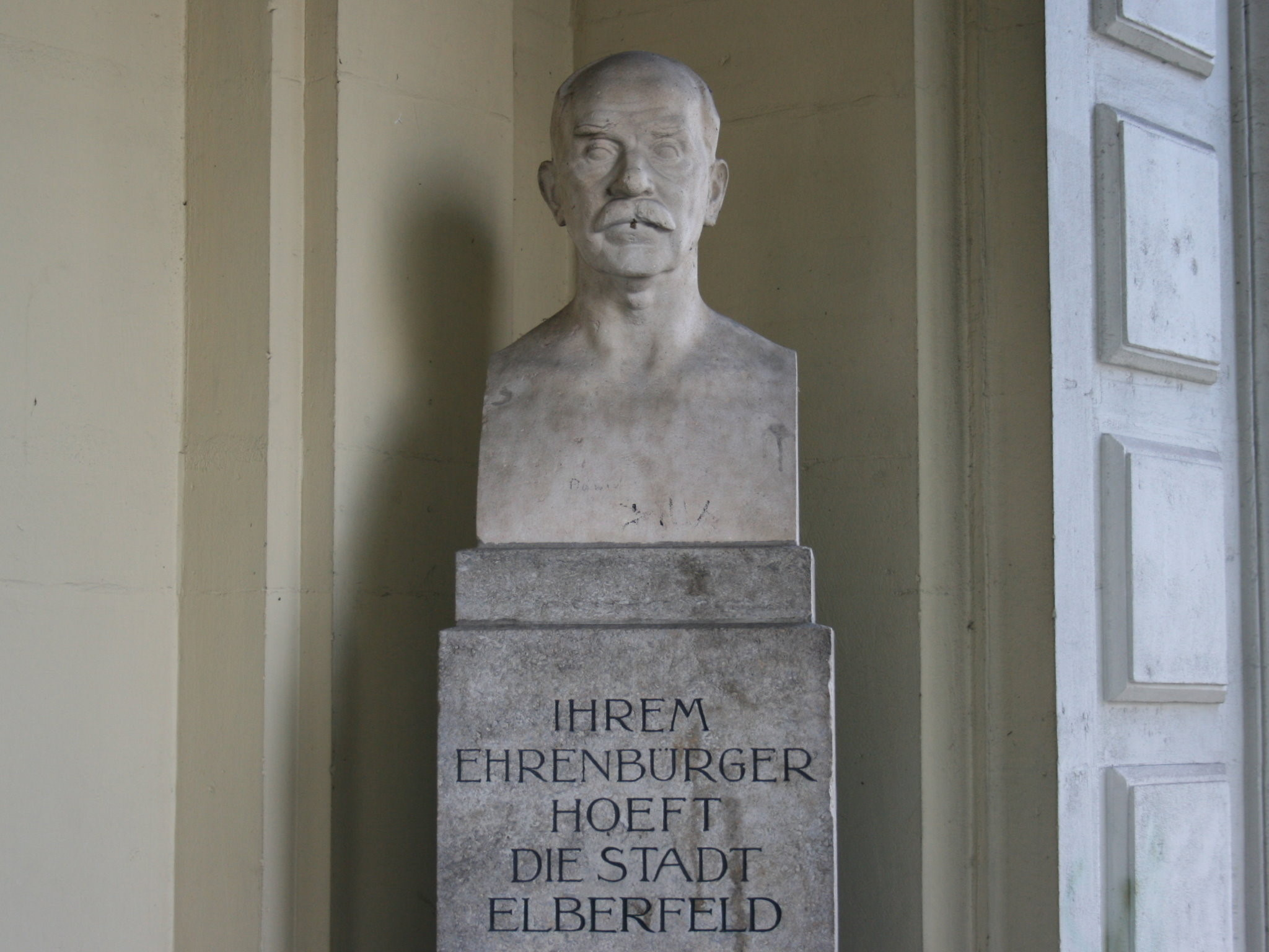 Gebäude der ehemaligen Bundesbahndirektion in Wuppertal, derzeit leer stehend; Büste des Wuppertaler Ehrenbürgers Christian Hoeft (* 10. Mai 1847 in Riesenberg/Schlesien, † 8. Februar 1935 in Wuppertal-Elberfeld)